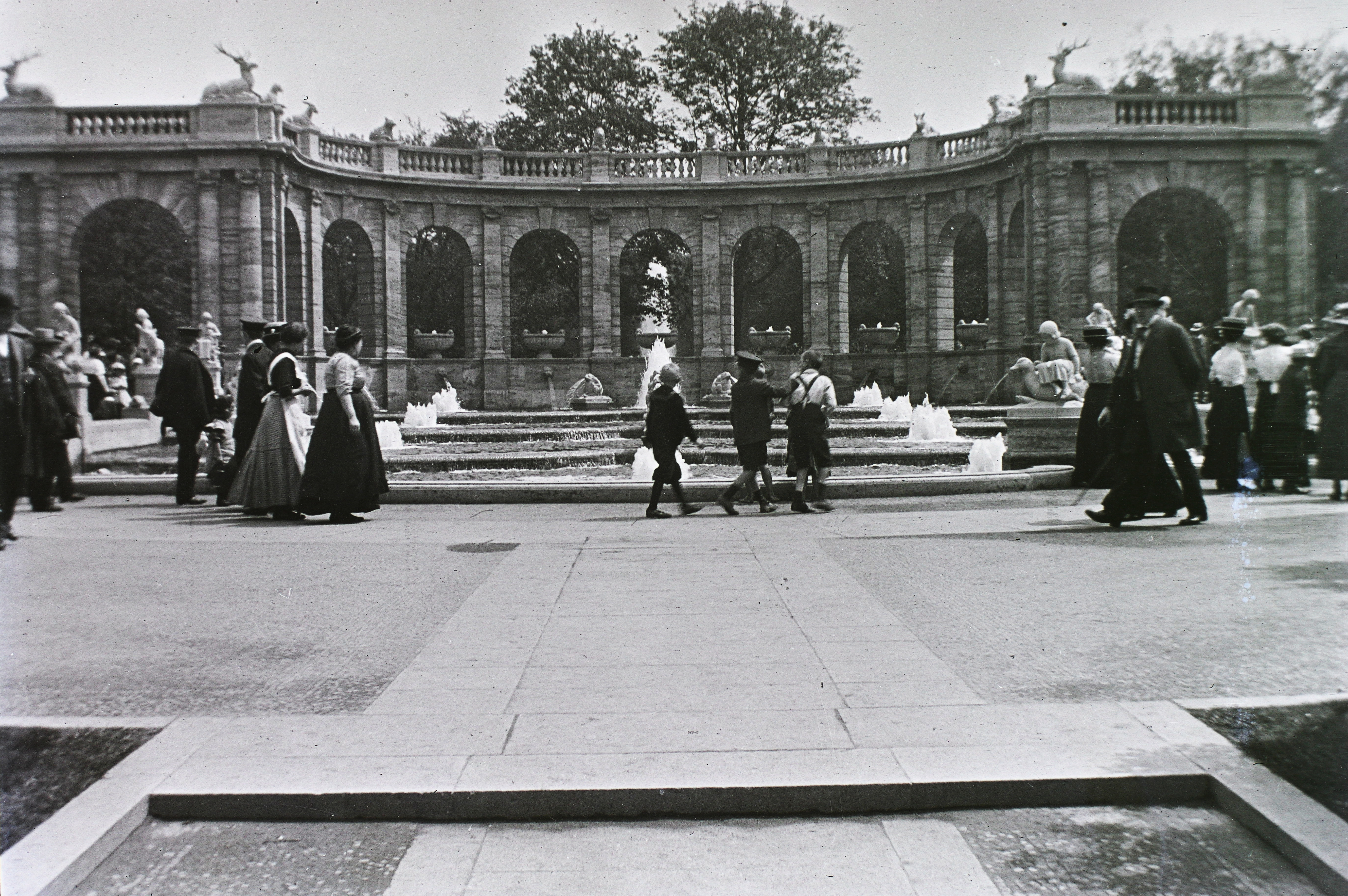 Volkspark Friedrichshain, Märchenbrunnen. Location: Germany, Berlin Tags: fountain, colonnade Title: Volkspark Friedrichshain, Märchenbrunnen.